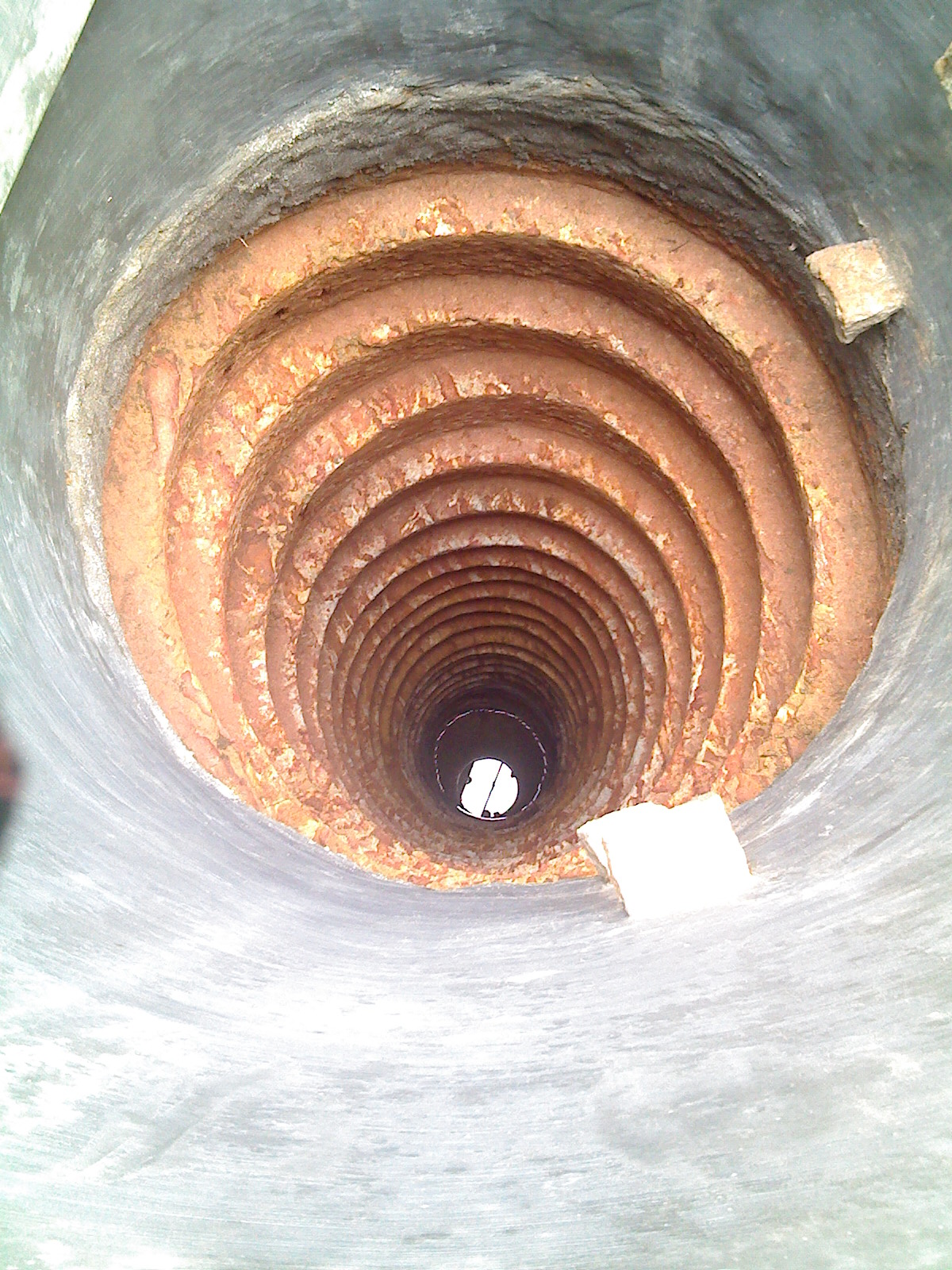 Water well Inside View